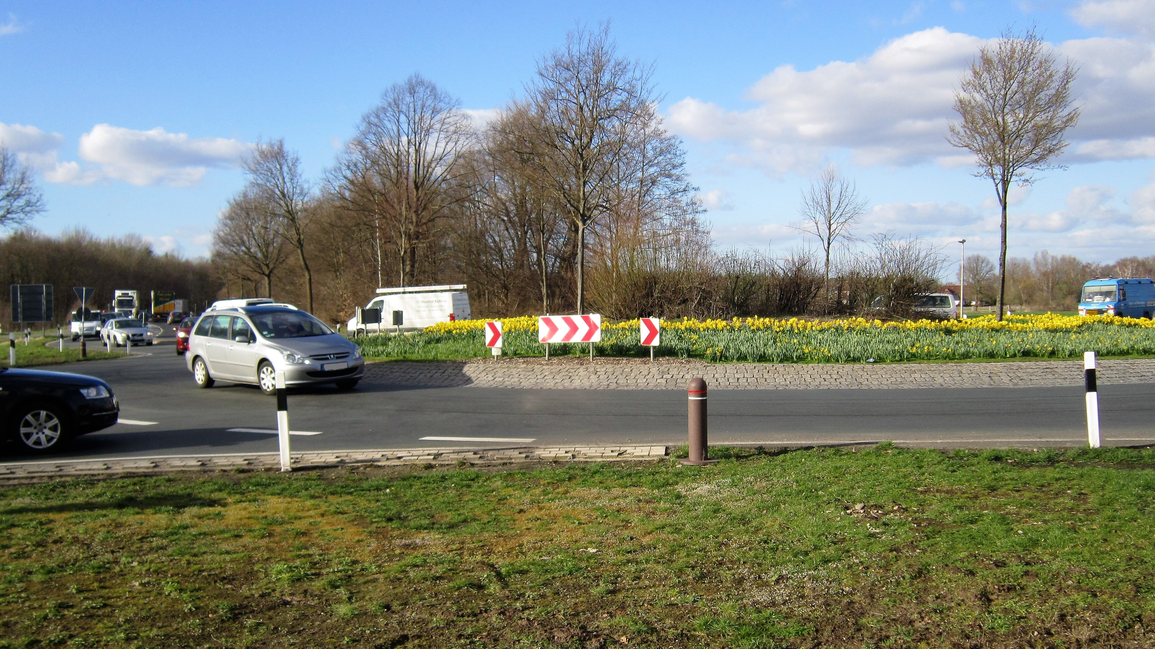 Beginn der Bundesstraße 69 im Norden von Diepholz (hinten). Links geht es nach Osnabrück (B 51) und Lingen (B 214), rechts nach Bremen (B 51) und Nienburg bzw. Herford (B 214).